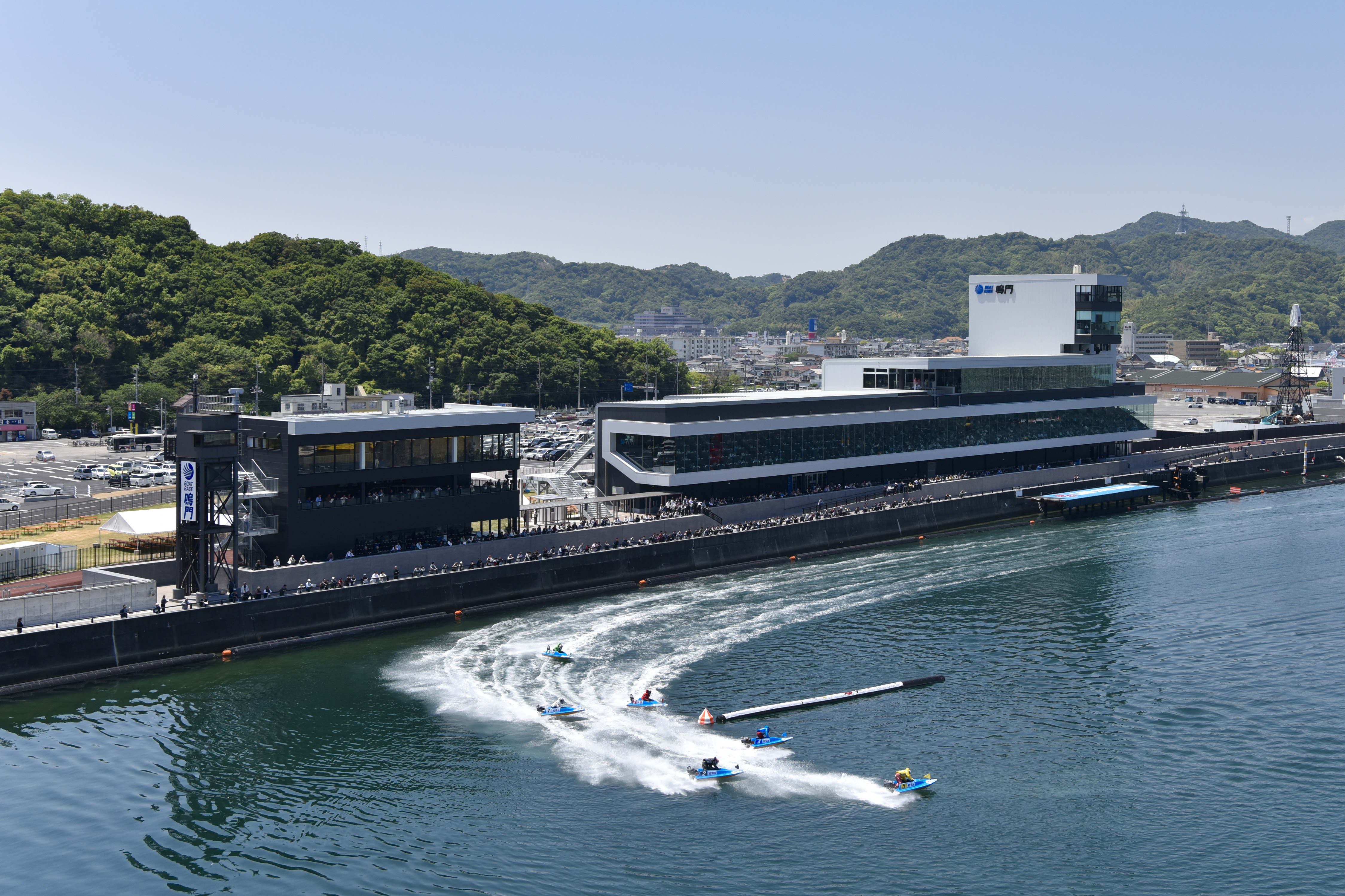 鳴門競艇場外観